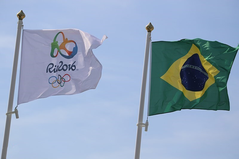 Флаги XXXI Летних Олимпийских игр 2016 года и Бразилии